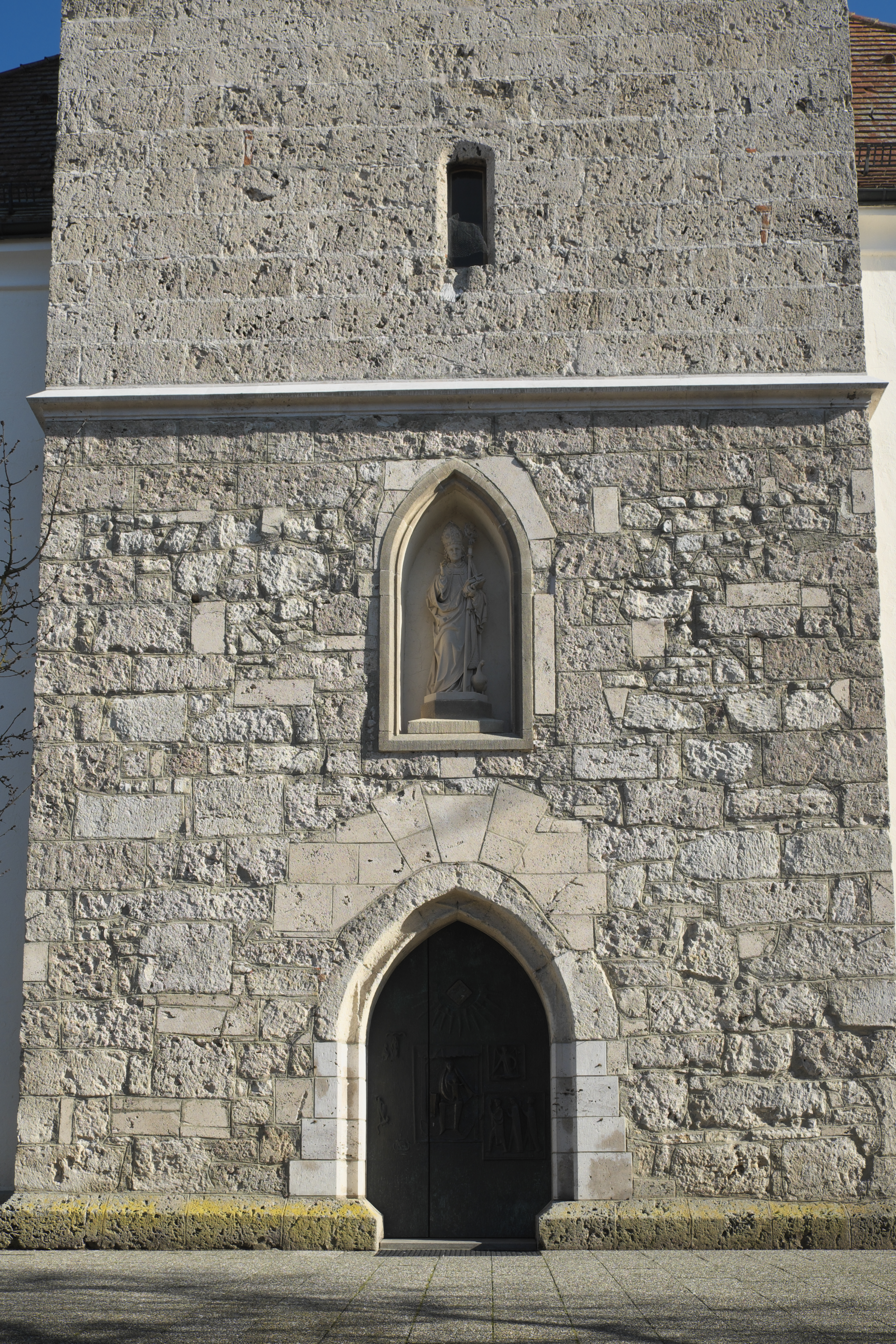 Katholische Pfarrkirche St. Martin in Altheim (bei Riedlingen) im Landkreis Biberach (Baden-Württemberg/Deutschland)